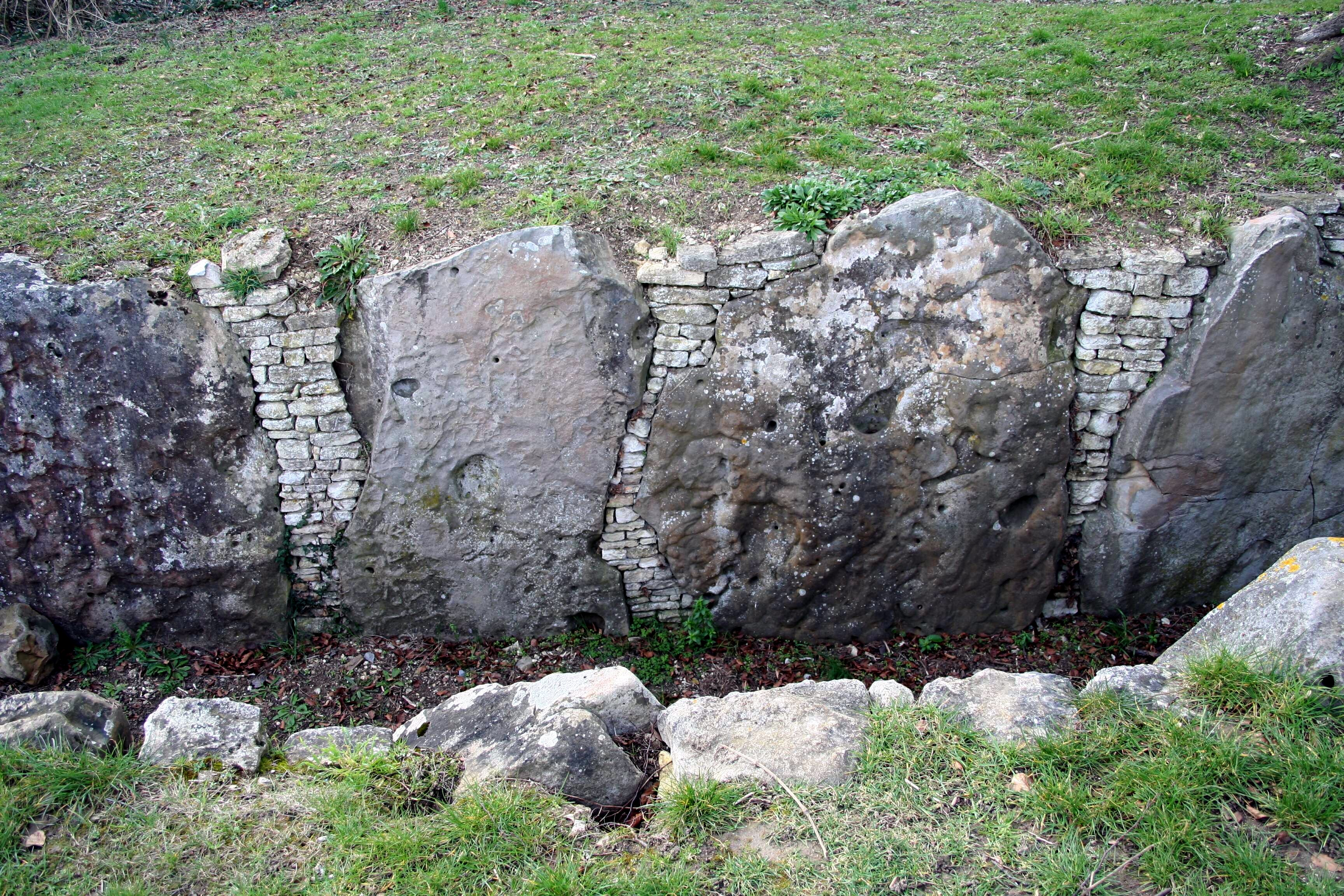 La Cave aux Fées à Brueil-en-Vexin - Yvelines (France), vestiges d'une allée couverte de l'époque néolithique.